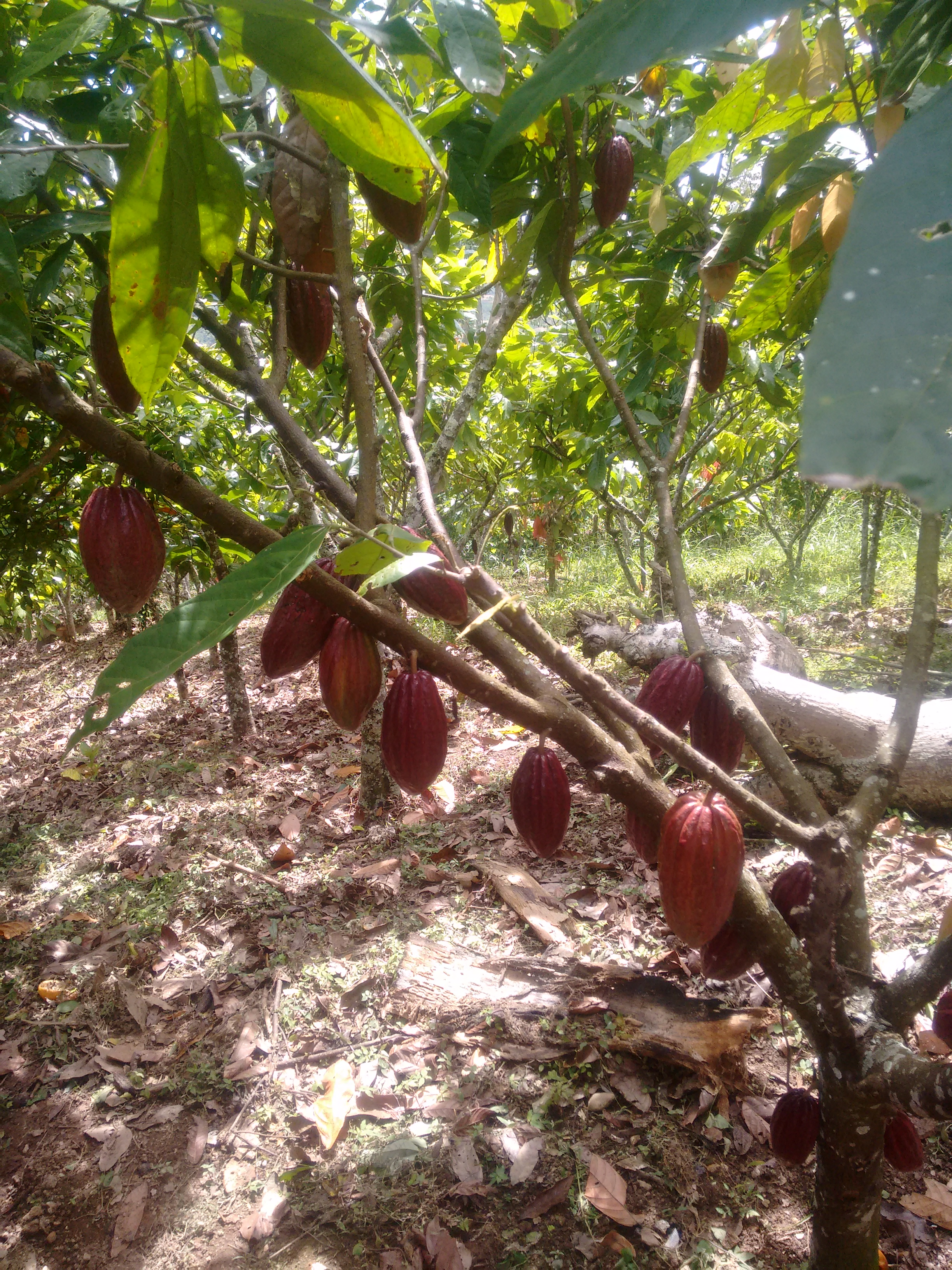 Arbol de cacao